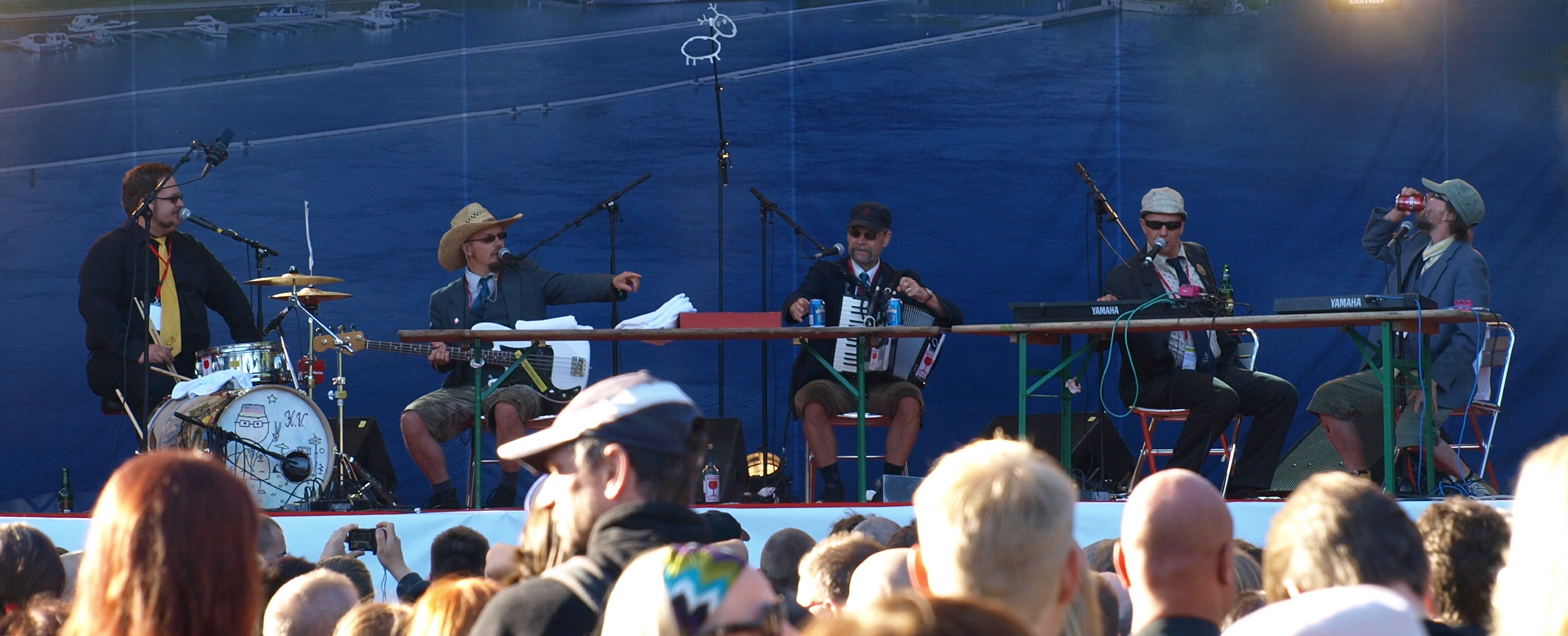 Die finnische Humppa-Band Eläkeläiset bei einem gratis Open-Air-Konzert im Kaivopuisto-Park in Helsinki anlässlich der 160-Jahre-Stadtfeier von Joensuu